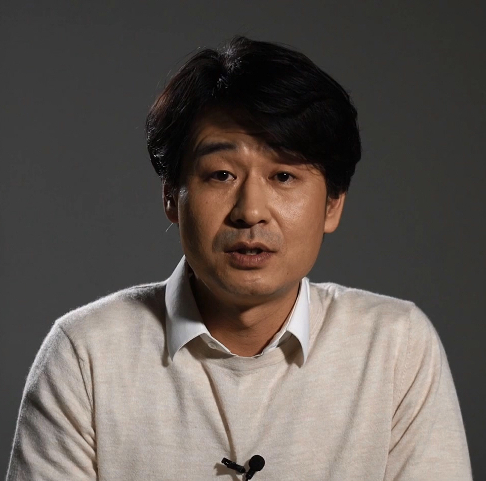 (장산범) 미스터리 열연 영상